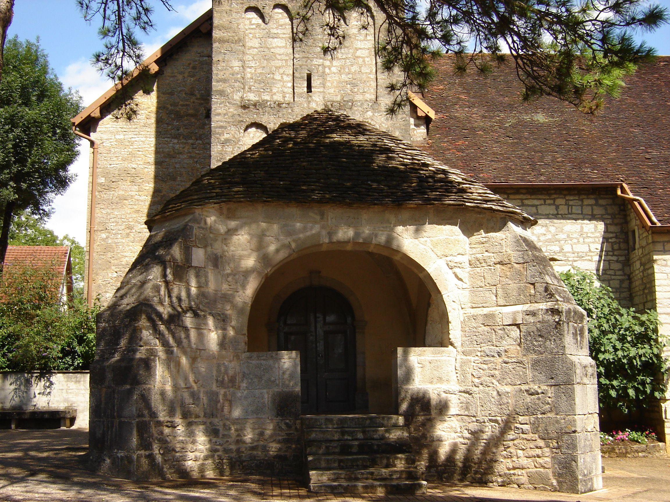 Le porche de l'Eglise St Etienne de Boussière dans le Doubs (1584)